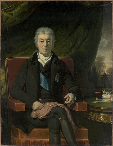 Воронцов Семен Романович